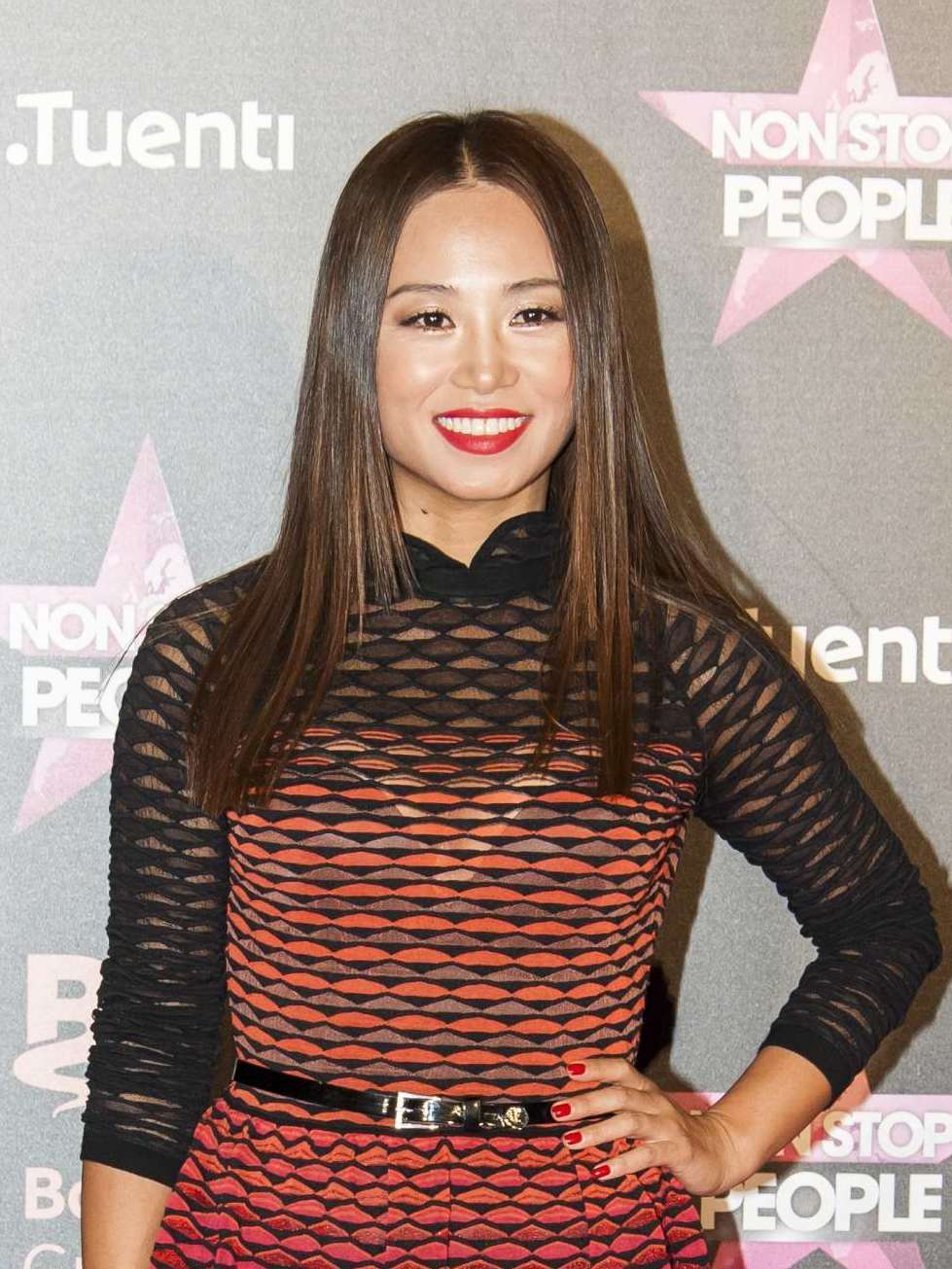 Fotos del photocall y fiesta de lanzamiento de un nuevo canal de televisión en España.